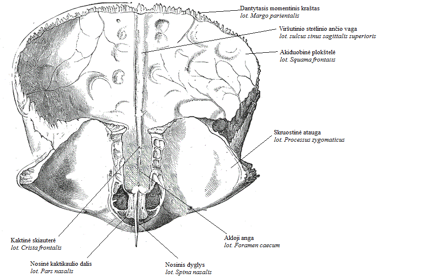 Kaktikaulis, os frontale. Vaizdas iš vidinės pusės